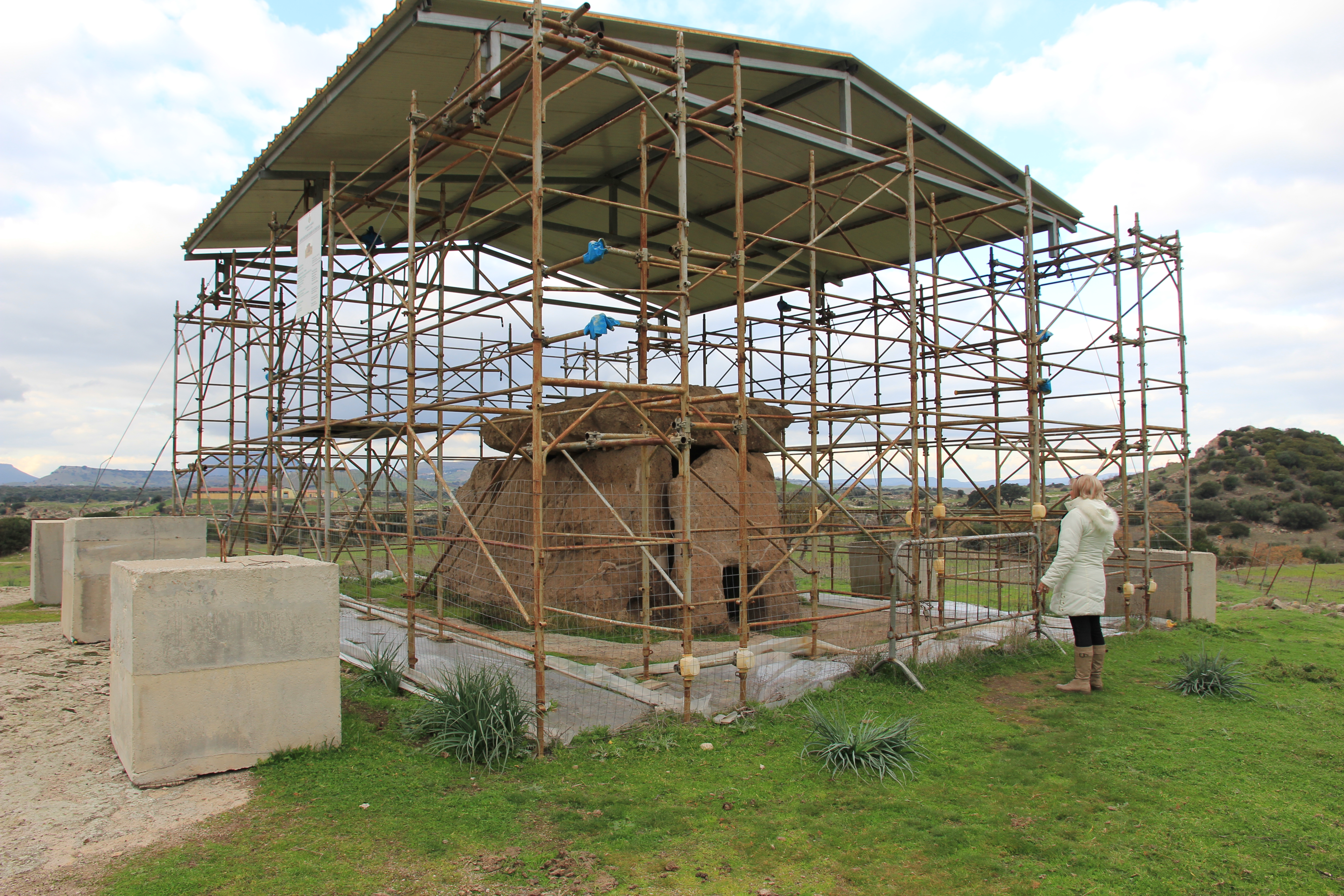 Mores - Dolmen di Sa Coveccada